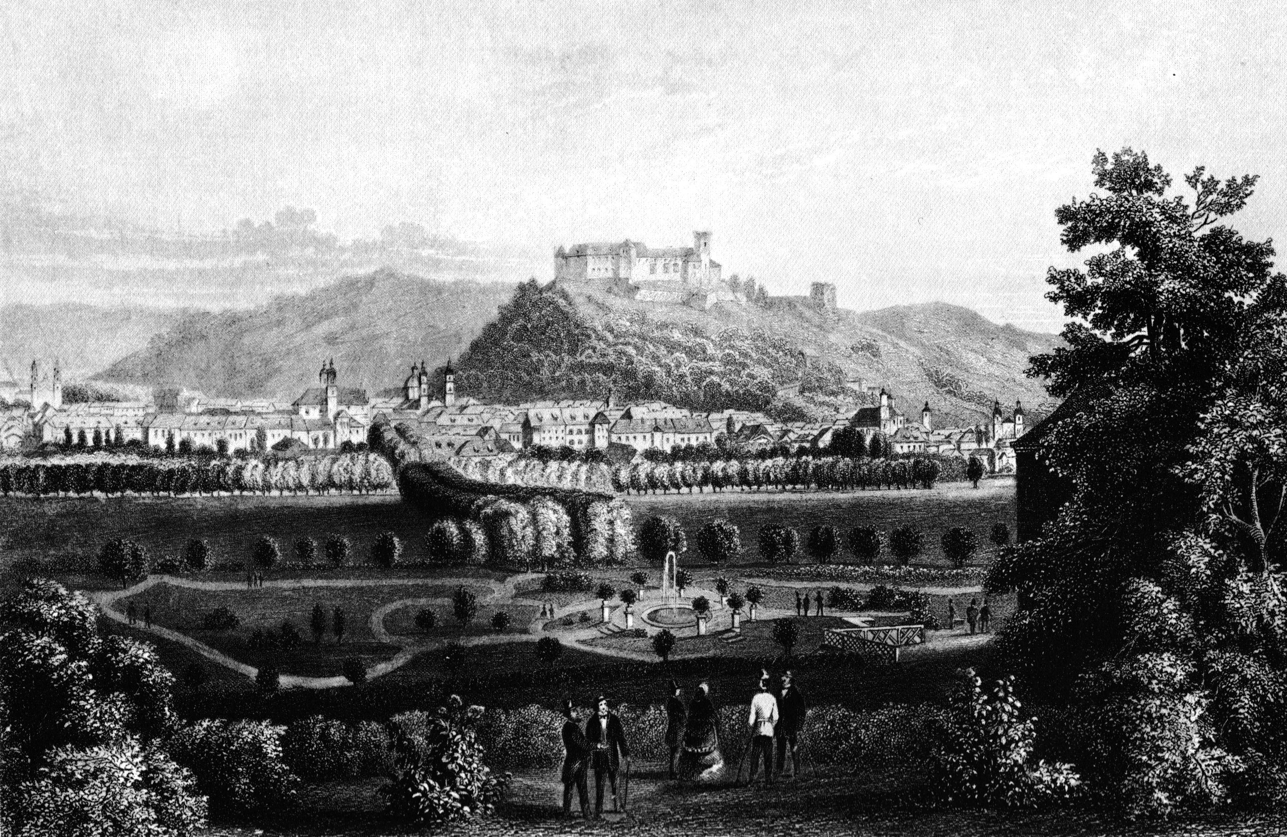 Ljubljana around 1855.